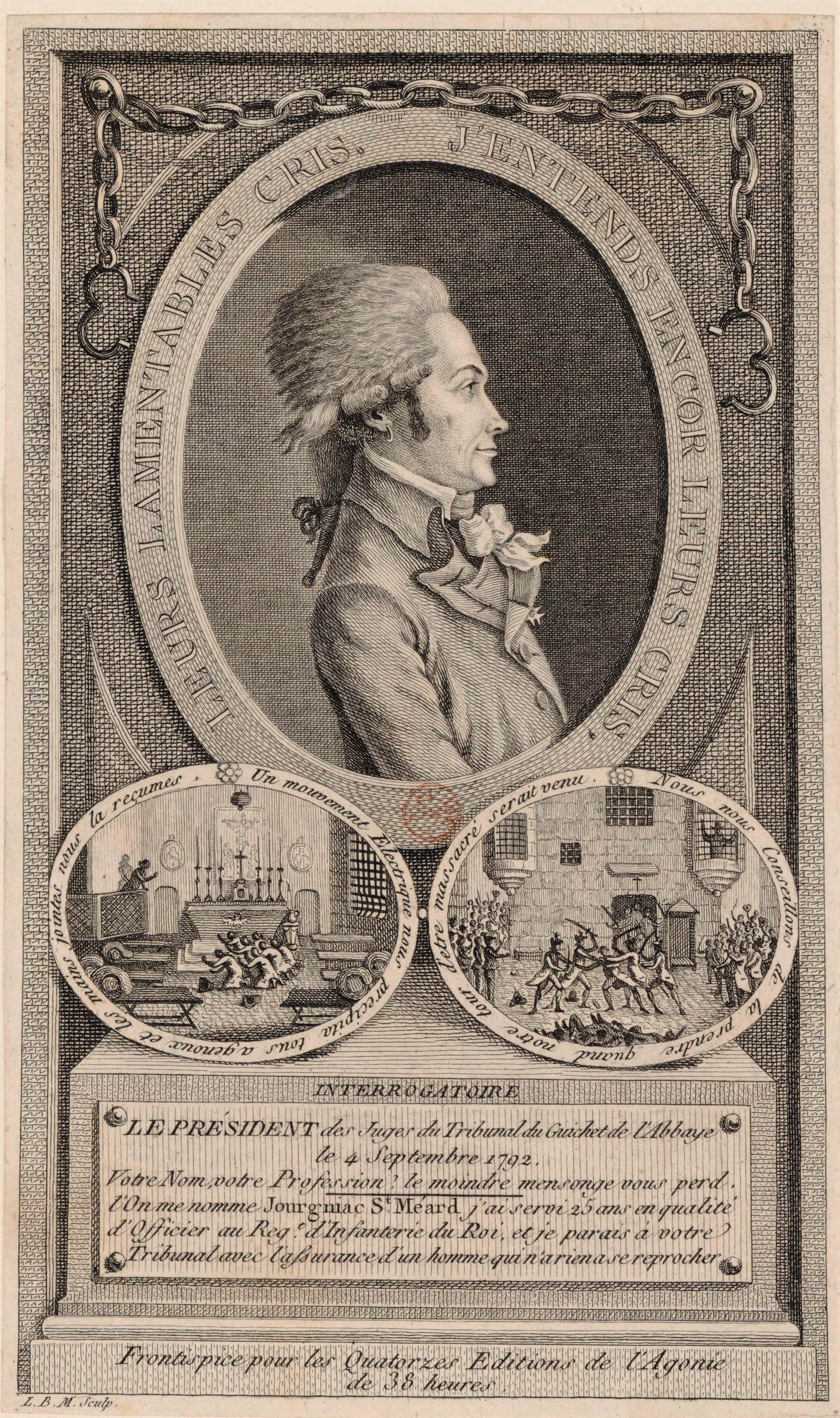 Le Président des Juges du Tribunal du Guichet de l'Abbaye le 4 Septembre 1792.